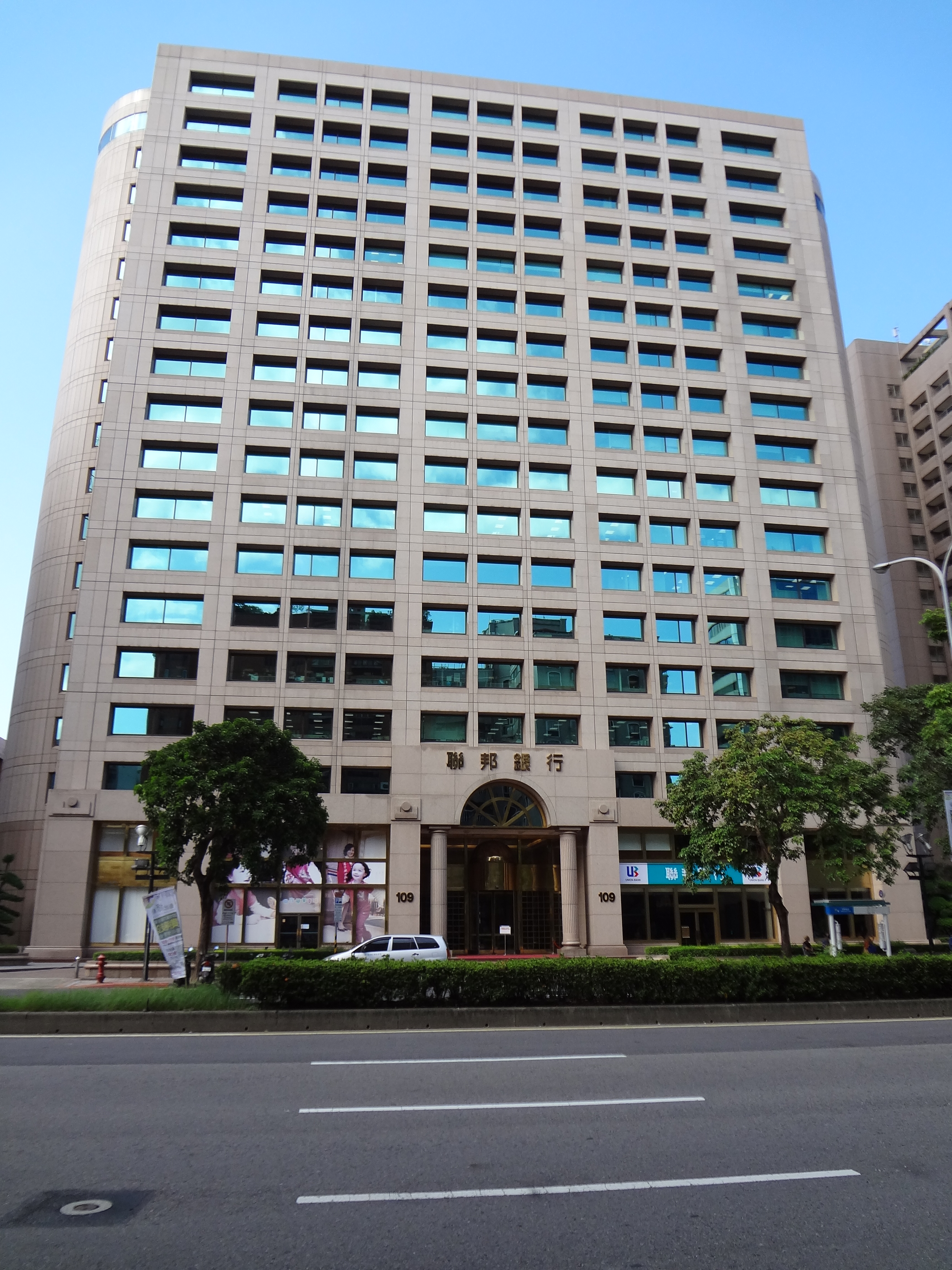 聯邦企業大樓，位於臺灣臺北市松山區民生東路三段109號，曾為聯邦建設總部所在地，現為聯邦商業銀行總部、瓏山林都更總部與瓏山林聯合建築師事務所所在地。